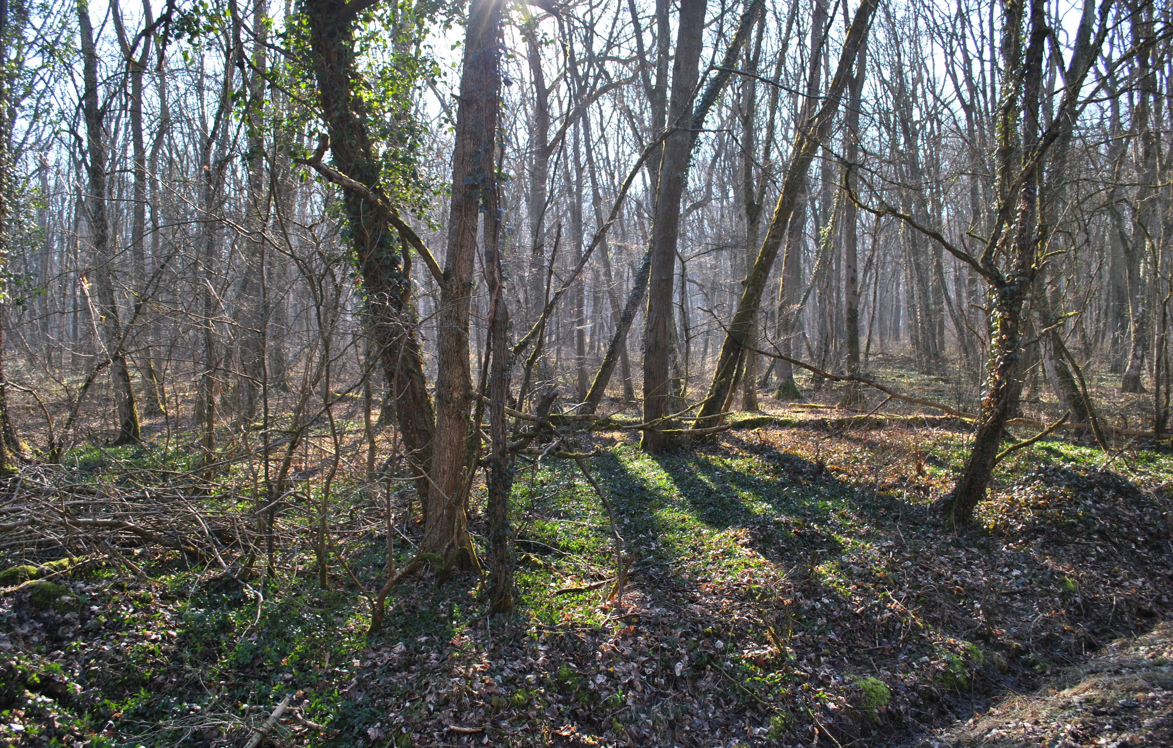 Nördlicher Teil des Naturwaldreservates Wolfsee